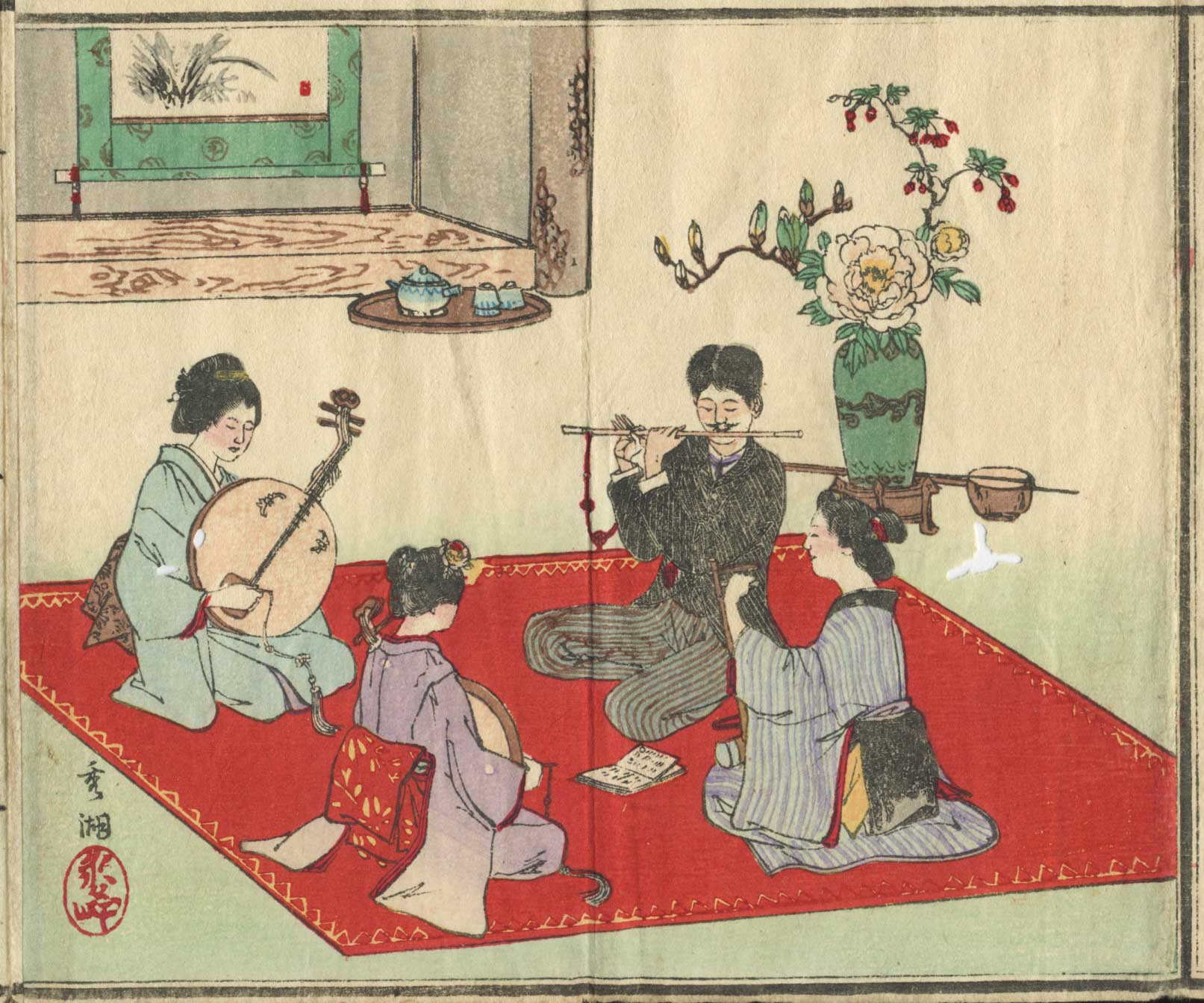 『月琴俗曲爪音の余興』1886年刊より、清楽の合奏の様子。